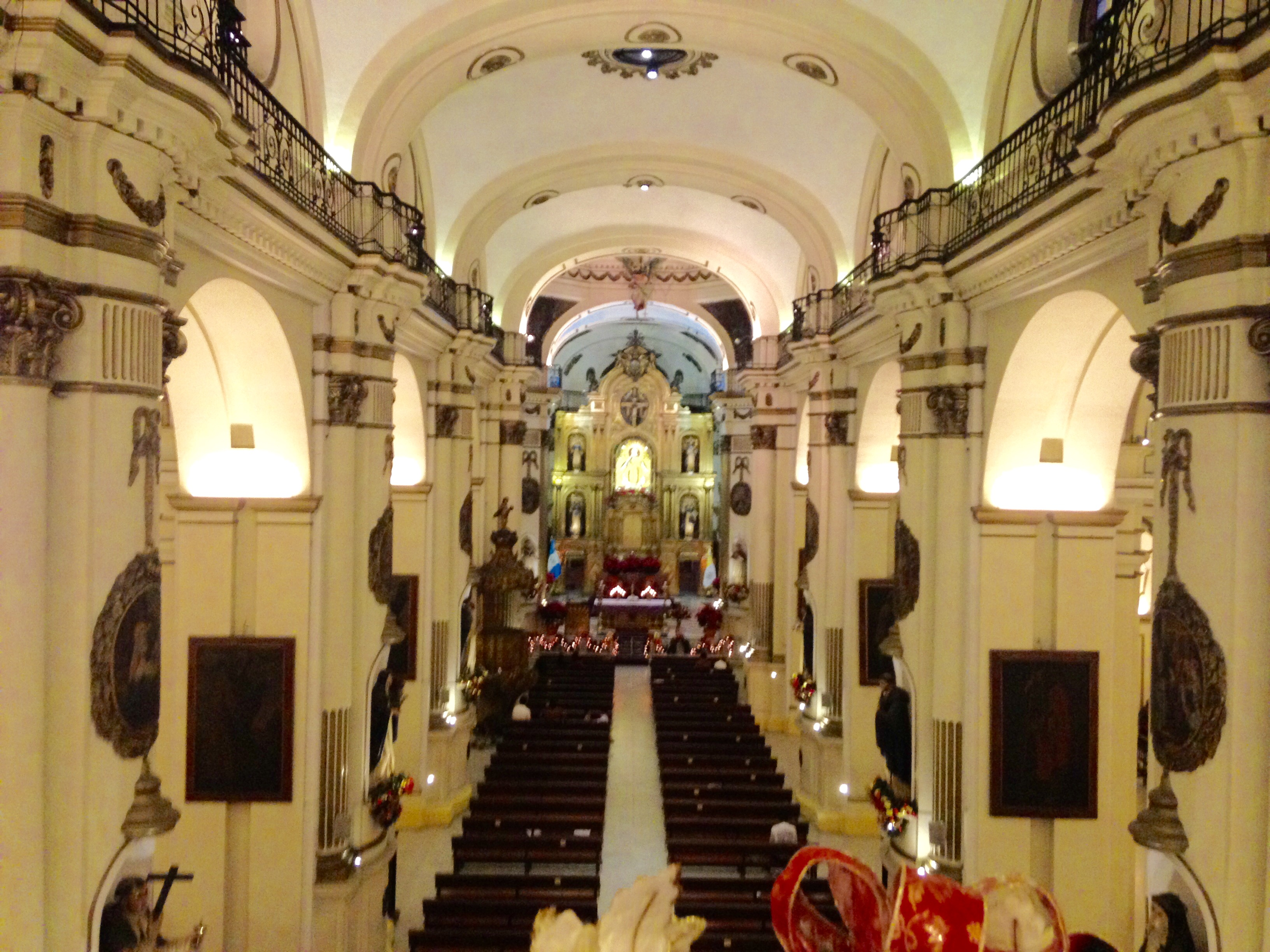 Nave central de la Iglesia de Santo Domingo en la Ciudad de Guatemala en diciembre de 2015.